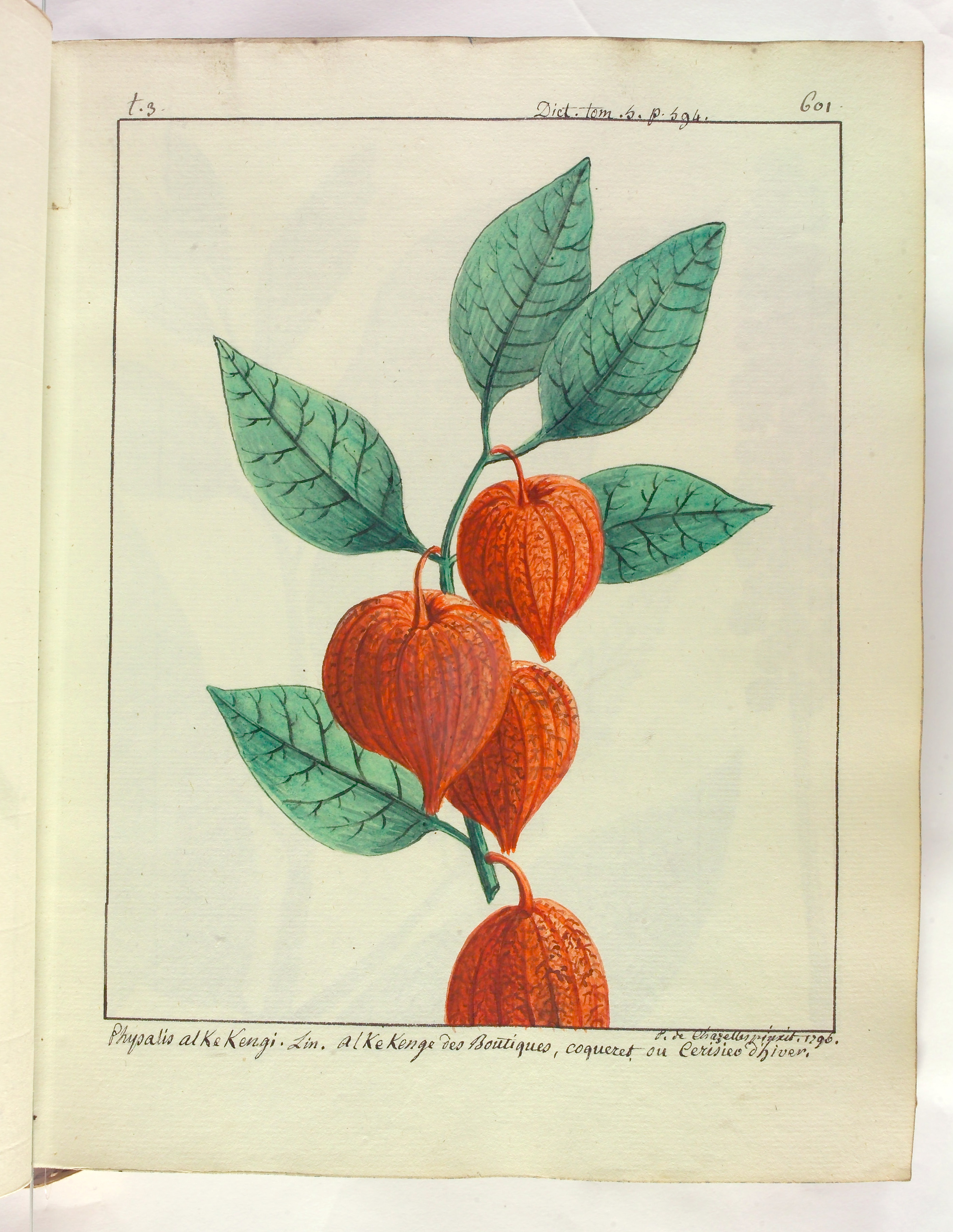 Physalis alkekengi, coqueret, cerisier d'hiver ou amour en cage, peints pour être joints au Dictionnaire des jardiniers, Tome 3, 1796 de Laurent de Chazelles